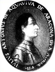 ritratto di Giulio Antonio Acquaviva in veste di condottiero conservato nella sala consiliare del Municipio di Giulianova.